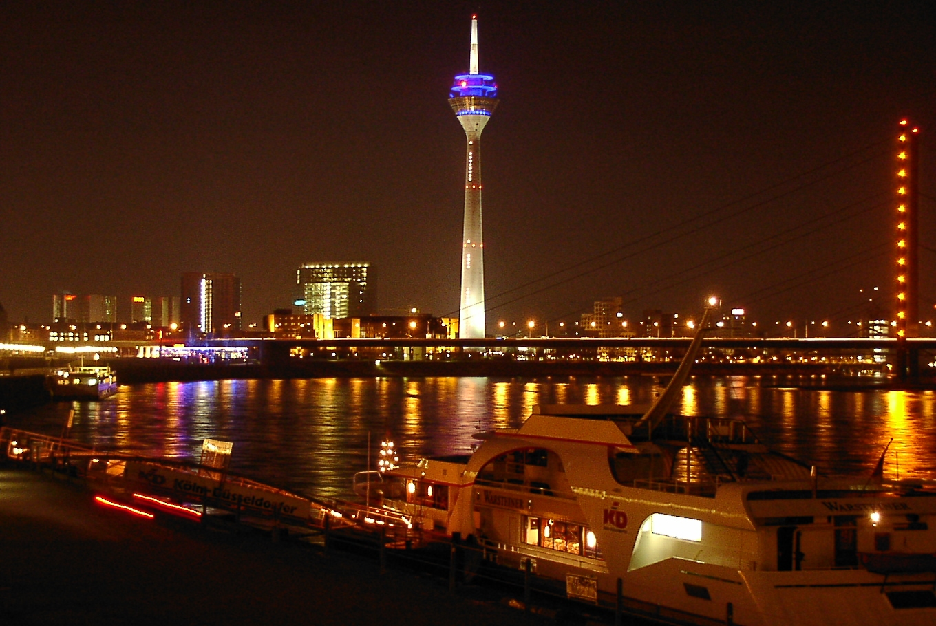 Düsseldorfer Rheinufer Nächtliche Sicht von der Freitreppe am Burgplatz auf die Rheinkniebrücke (Bild) Im Hintergrund von links nach rechts: Rheintor, Rheinturm und Medienhafen (Bilder)